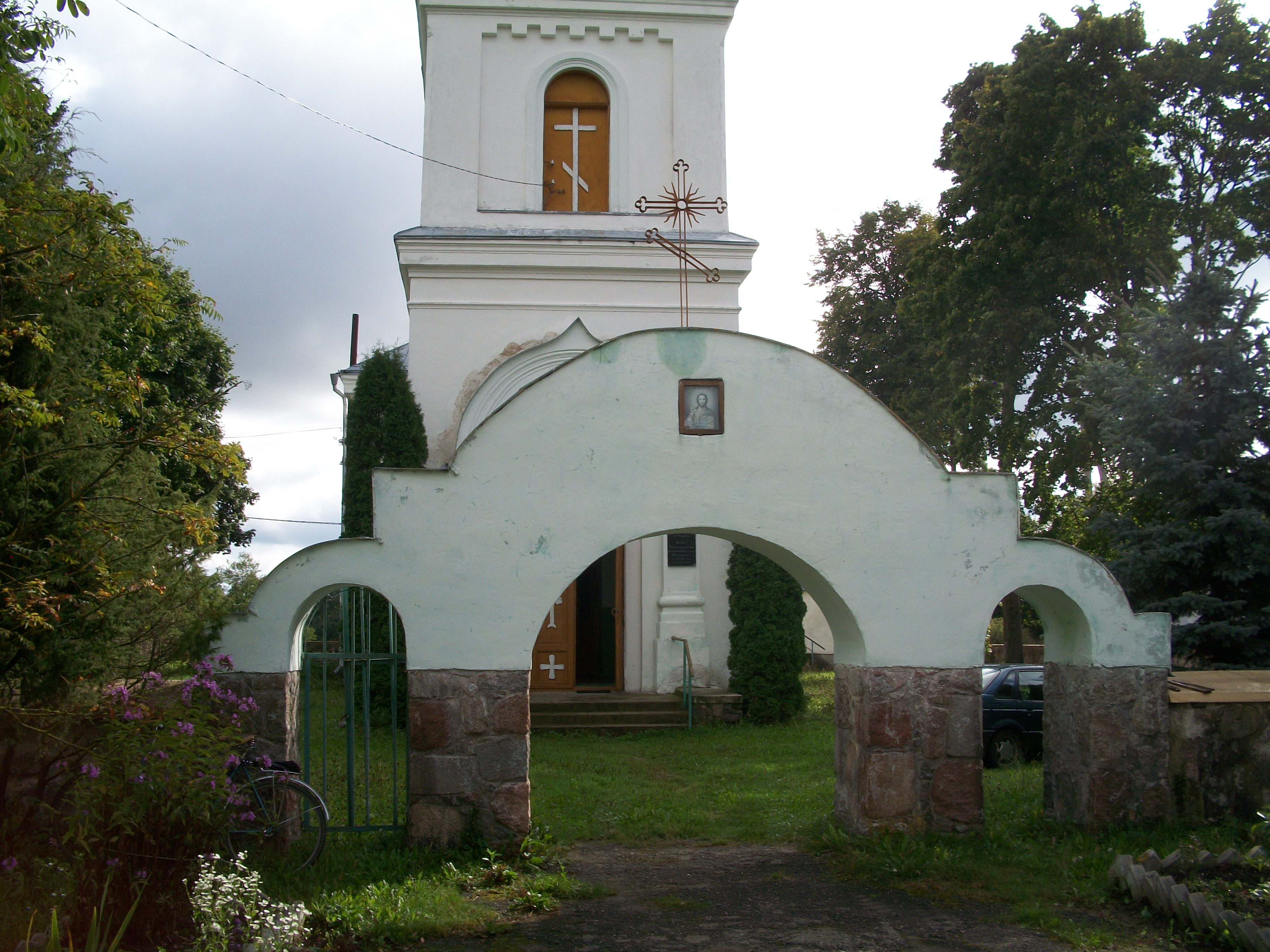 Беларуская (тарашкевіца): Траецкая царква. г.п. Крывічы This is a photo of Belarusian heritage monument. Reference number: 613Г000435 ( WLM)